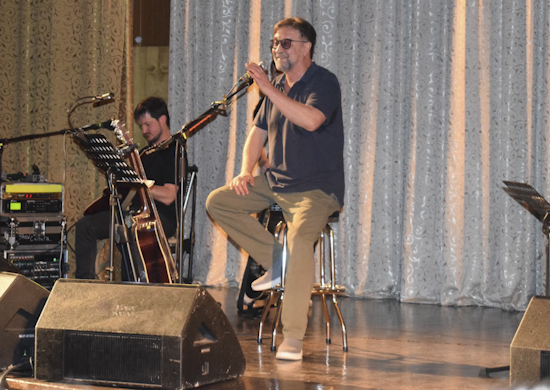 Выступление группы ДДТ для военнослужащих российской авиабазы Кант в Киргизии